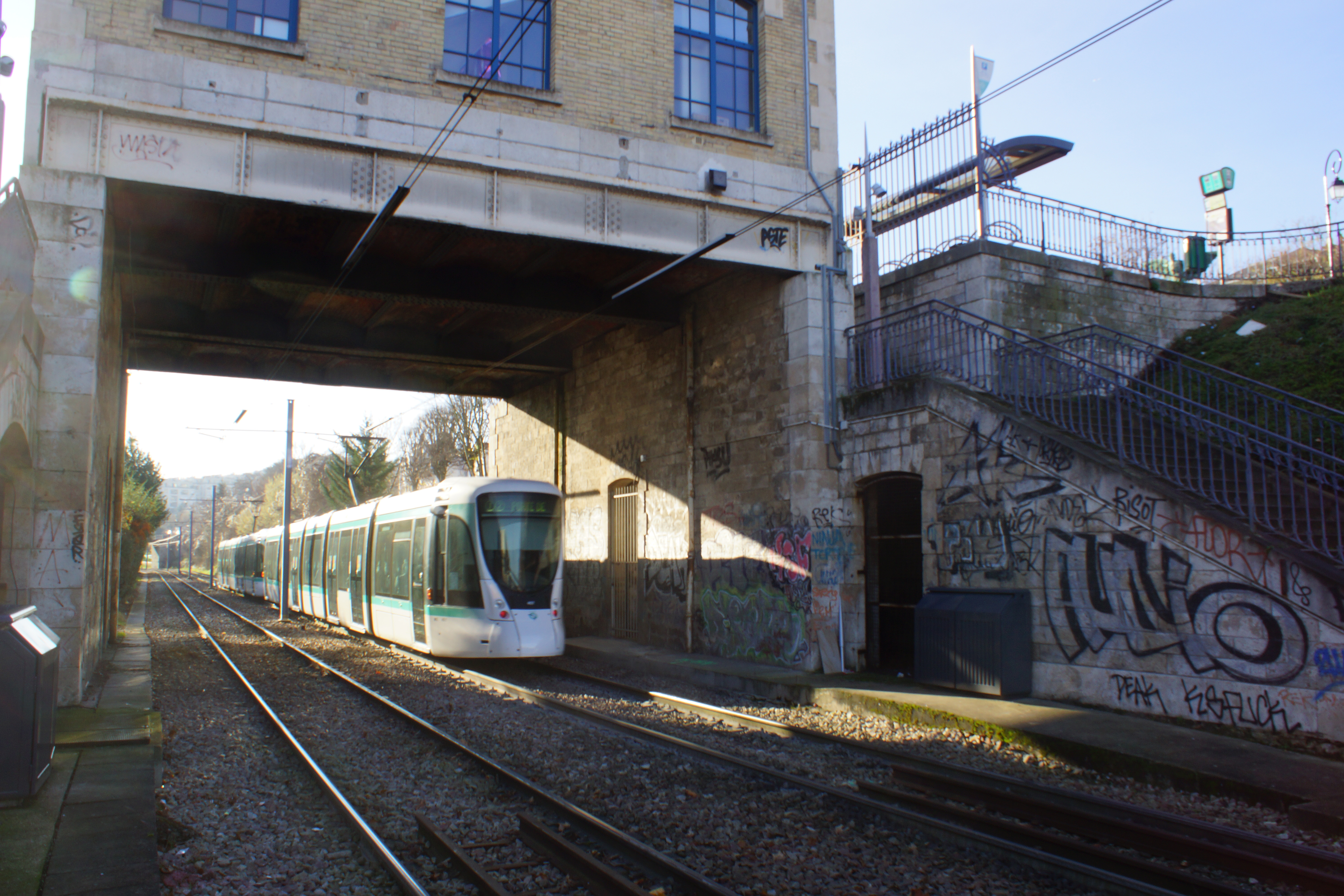 L'ancien bâtiment voyageurs de la gare surplombe les voies du nouveau tramway.